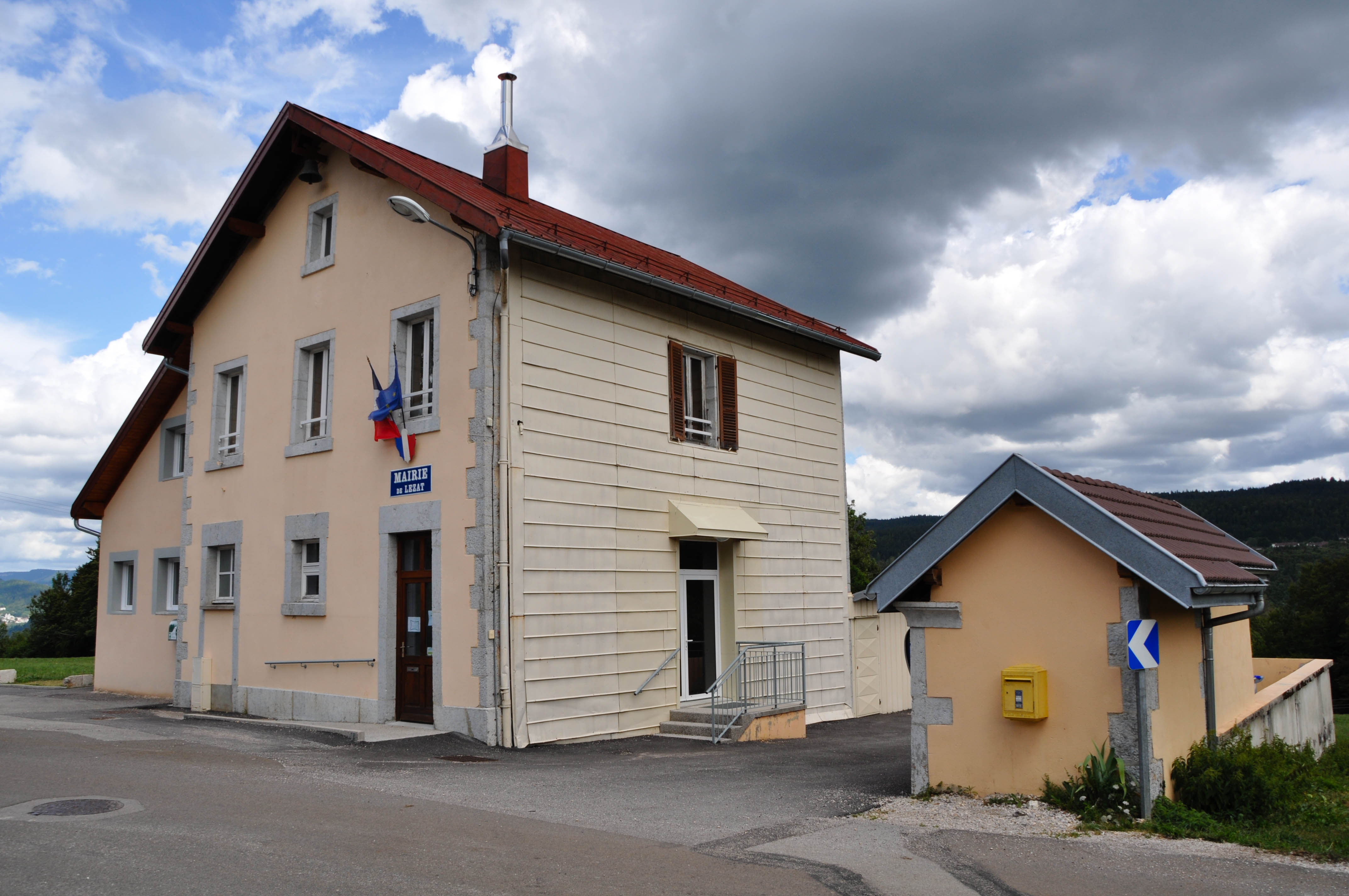 Mairie Les Mouillés, commune de Lézat (Jura, France).